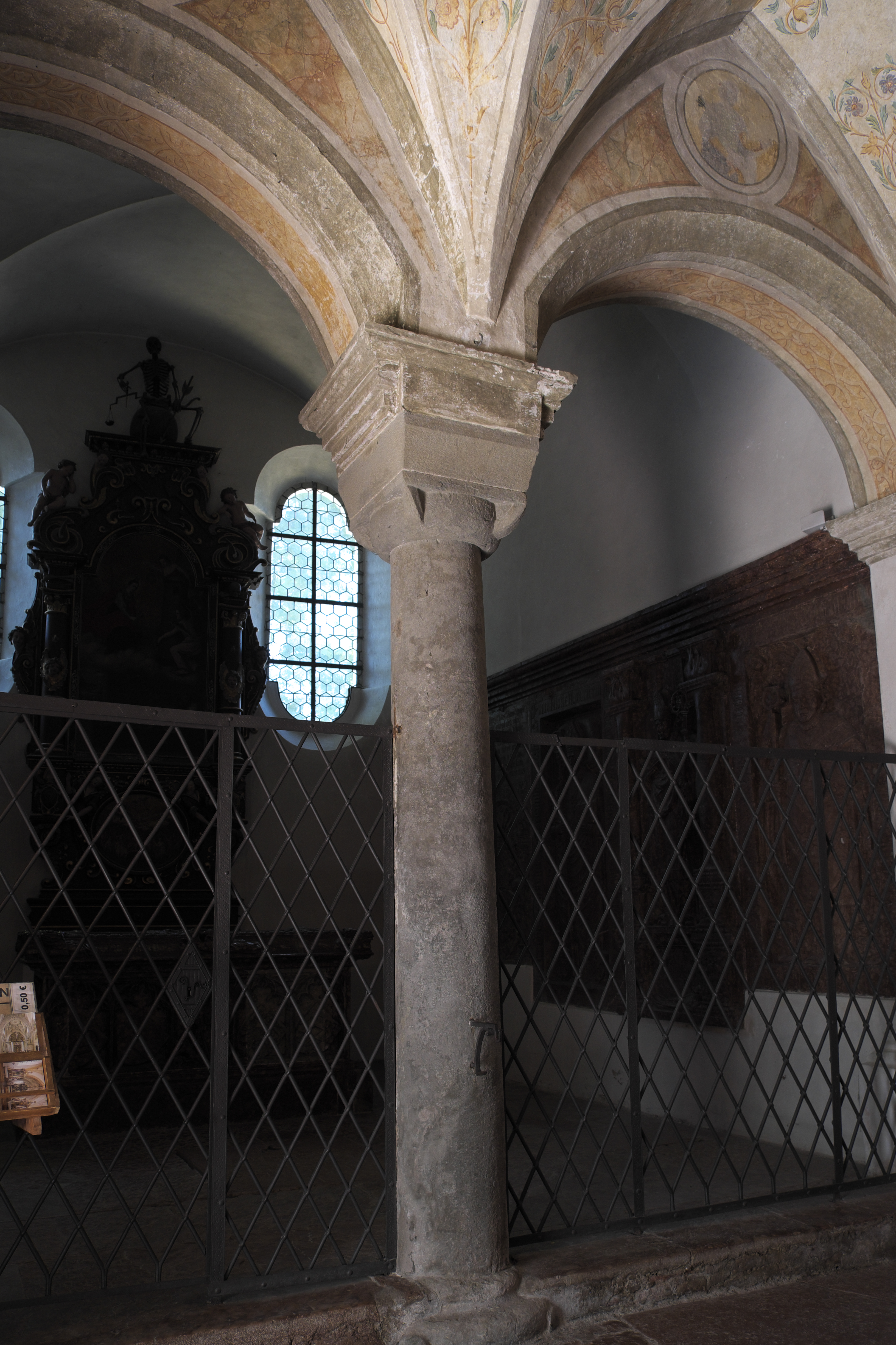 Katholische Pfarrkirche, ehemalige Benediktinerklosterkirche St. Lambert in Klosterseeon, einem Ortsteil von Seeon-Seebruck im Landkreis Traunstein (Bayern/Deutschland), Romanische Säule in der Vorhalle